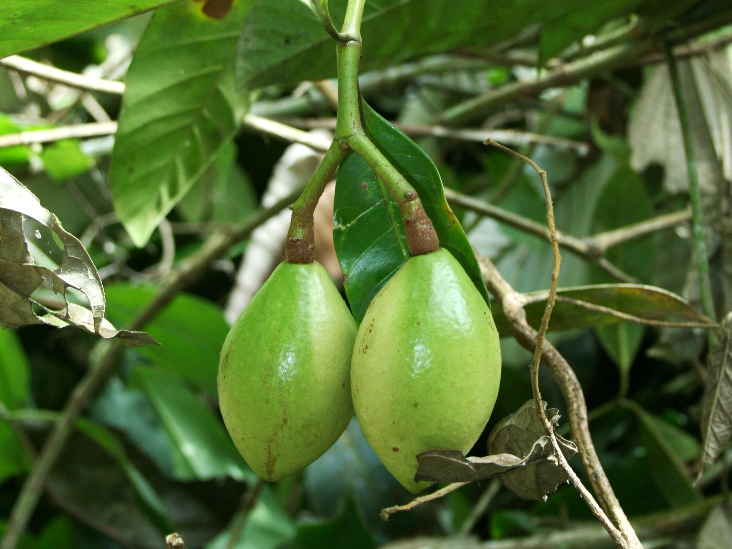 Plody Rhigospira quadrangularis, Rio Caura, Venezuela